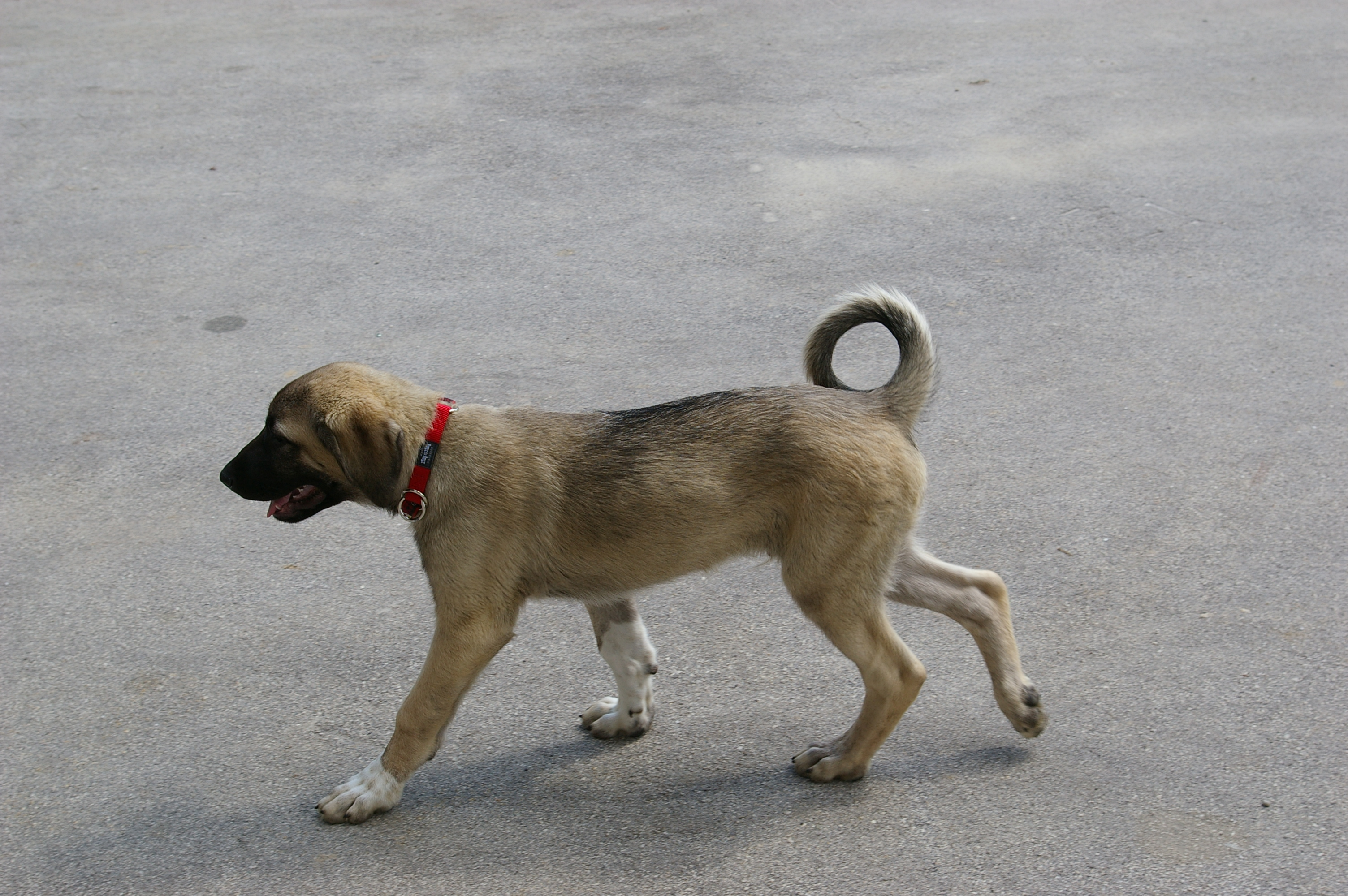 Mladič anatolskega ovčarja.